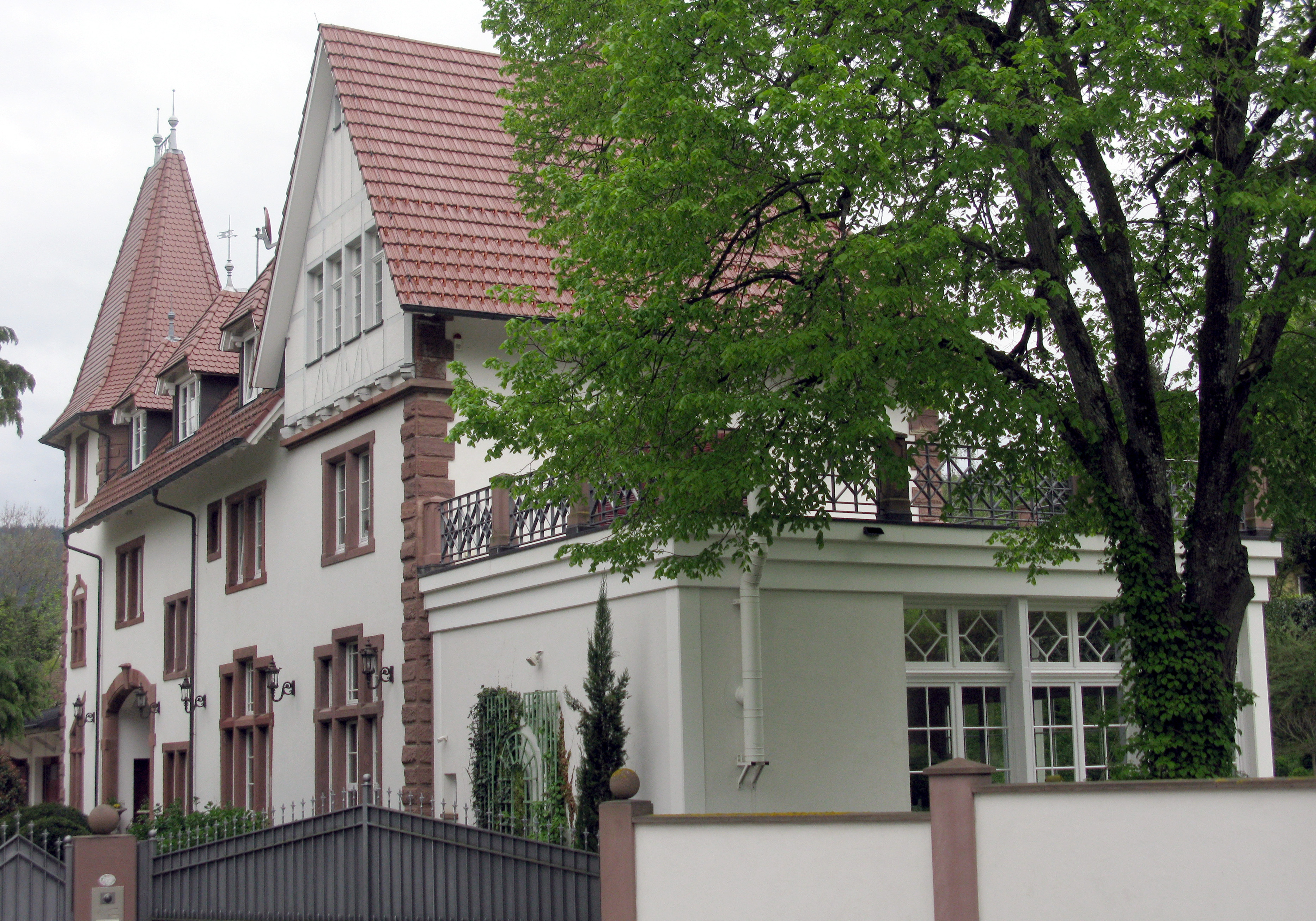 Ehemaliger Bahnhof von Badenweiler, unter Denkmalschutz, in Privatbesitz